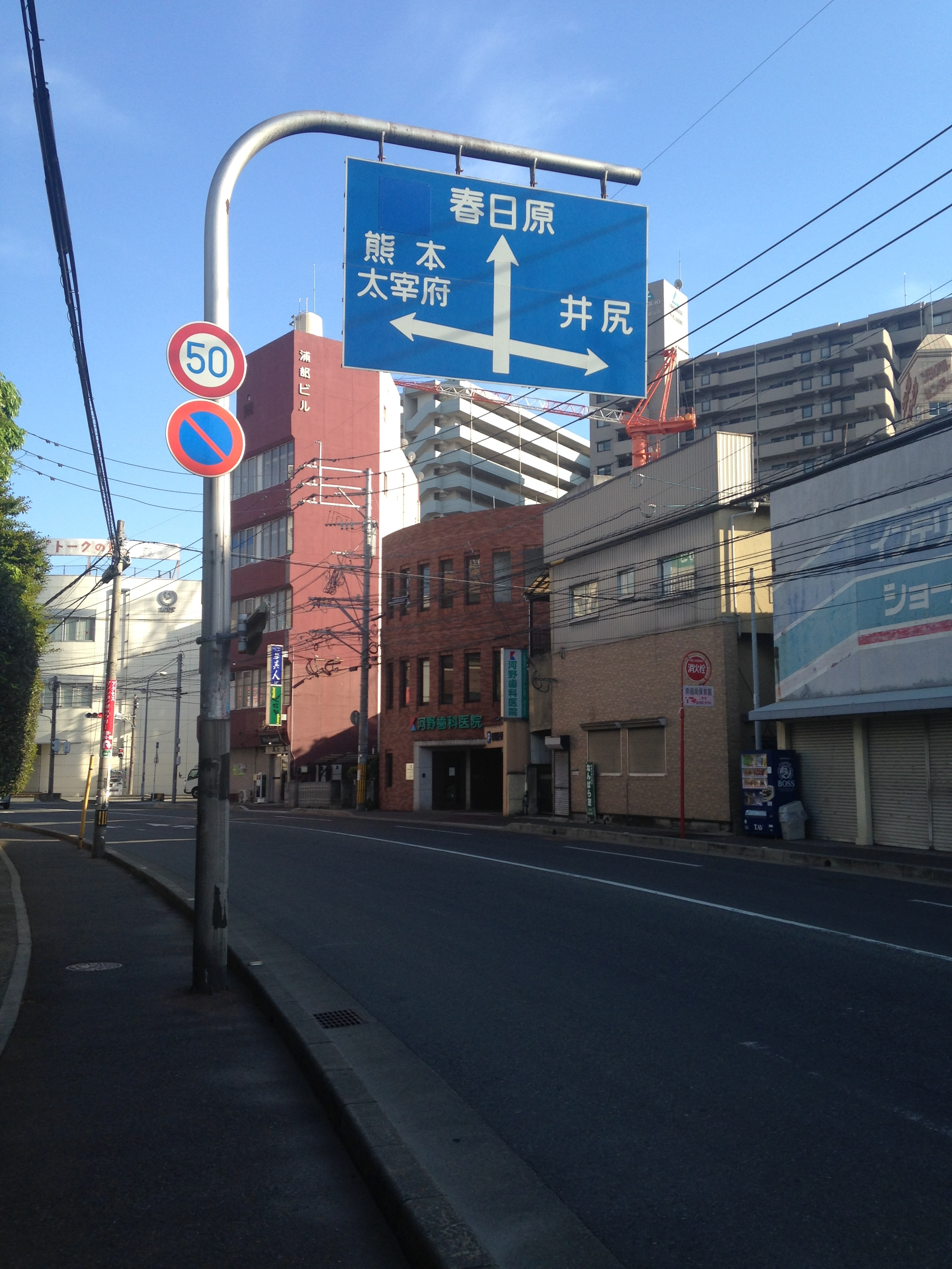 筑紫通りの道路標識